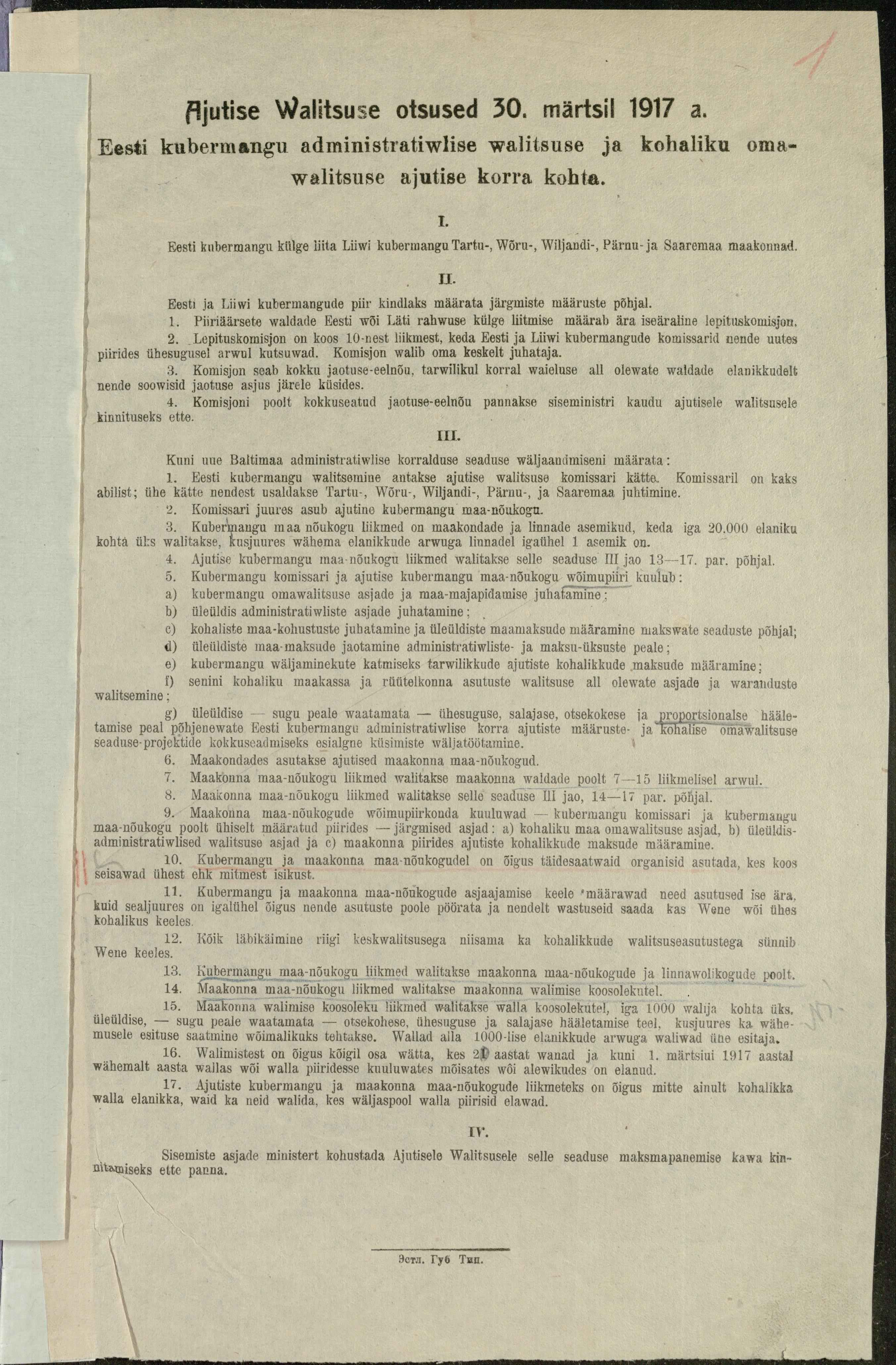 Venemaa Vabariigi Ajutise Valitsuse otsus (määrus) "Eestimaa kubermangu administratiivse juhtimise ja kohaliku omavalitsuse ajutise korra kohta" 12. aprillil (vkj 30. märtsil) 1917